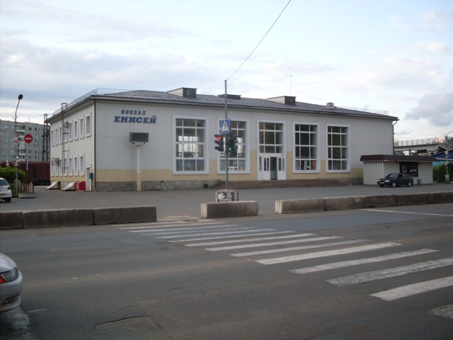 Вокзал ст. Енисей в г. Красноярске